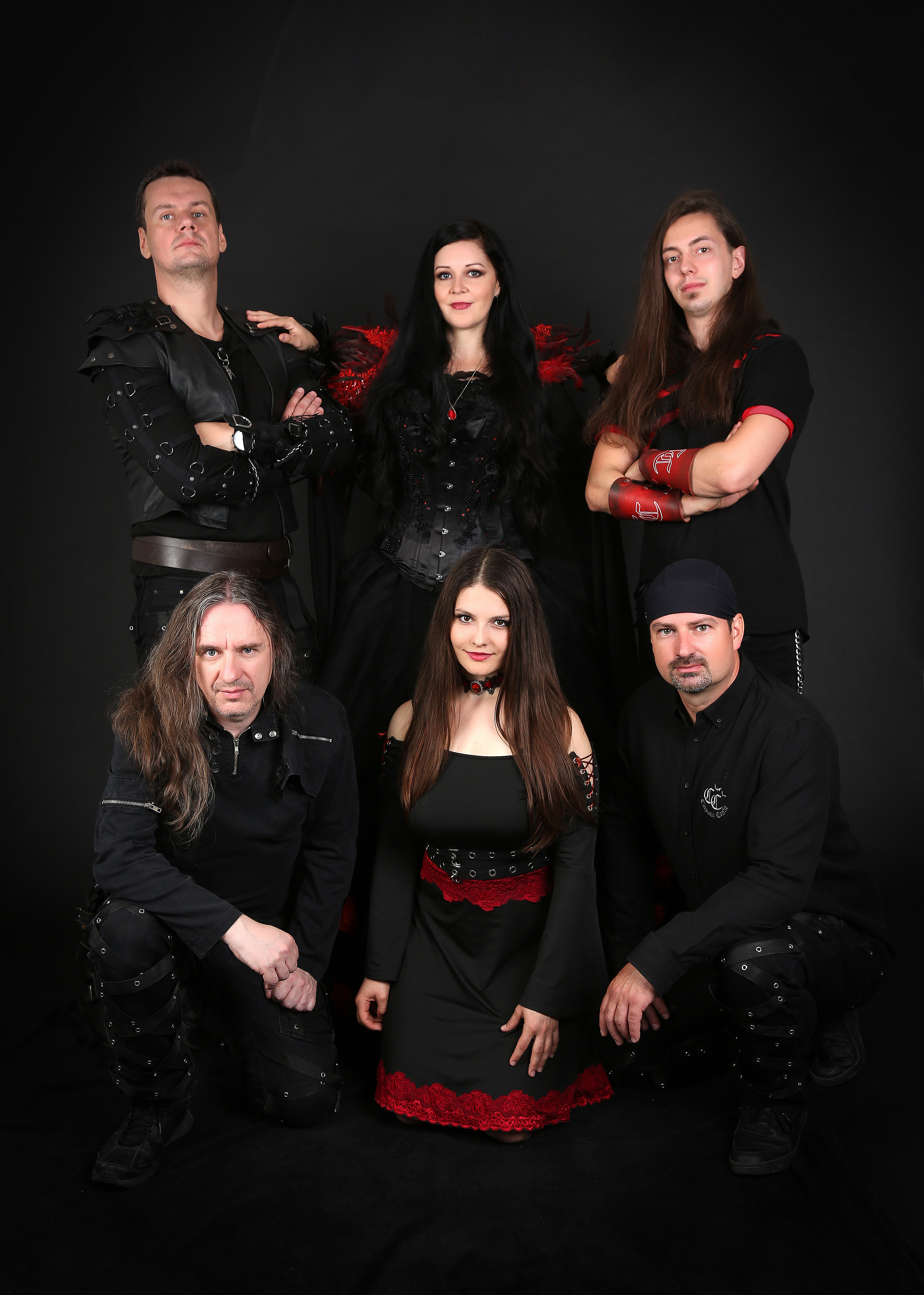 Carpatia Castle